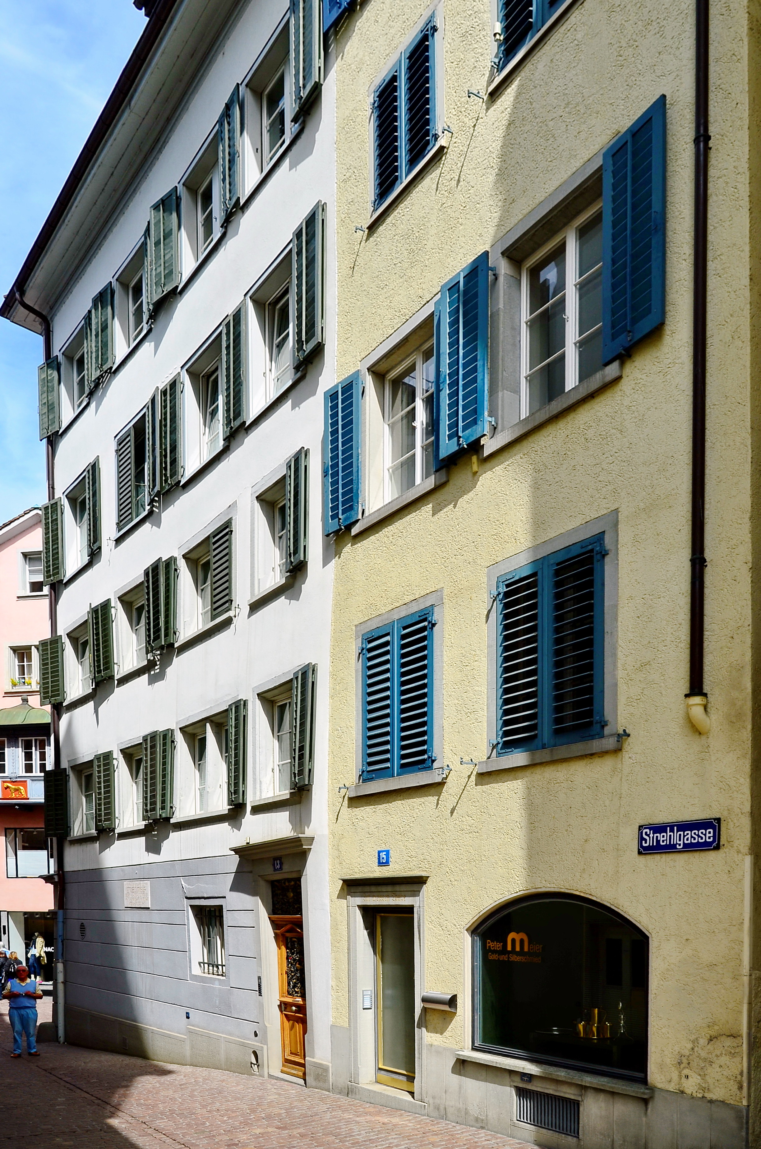 Strehlgasse 13 (Gottlieb Duttweiler) in Zürich-Lindenhof (Switzerland)